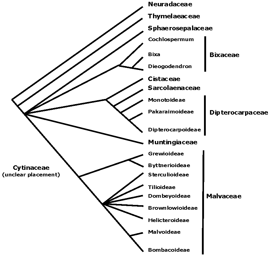 Tự vẽ lại theo APG. Sử dụng tự do.